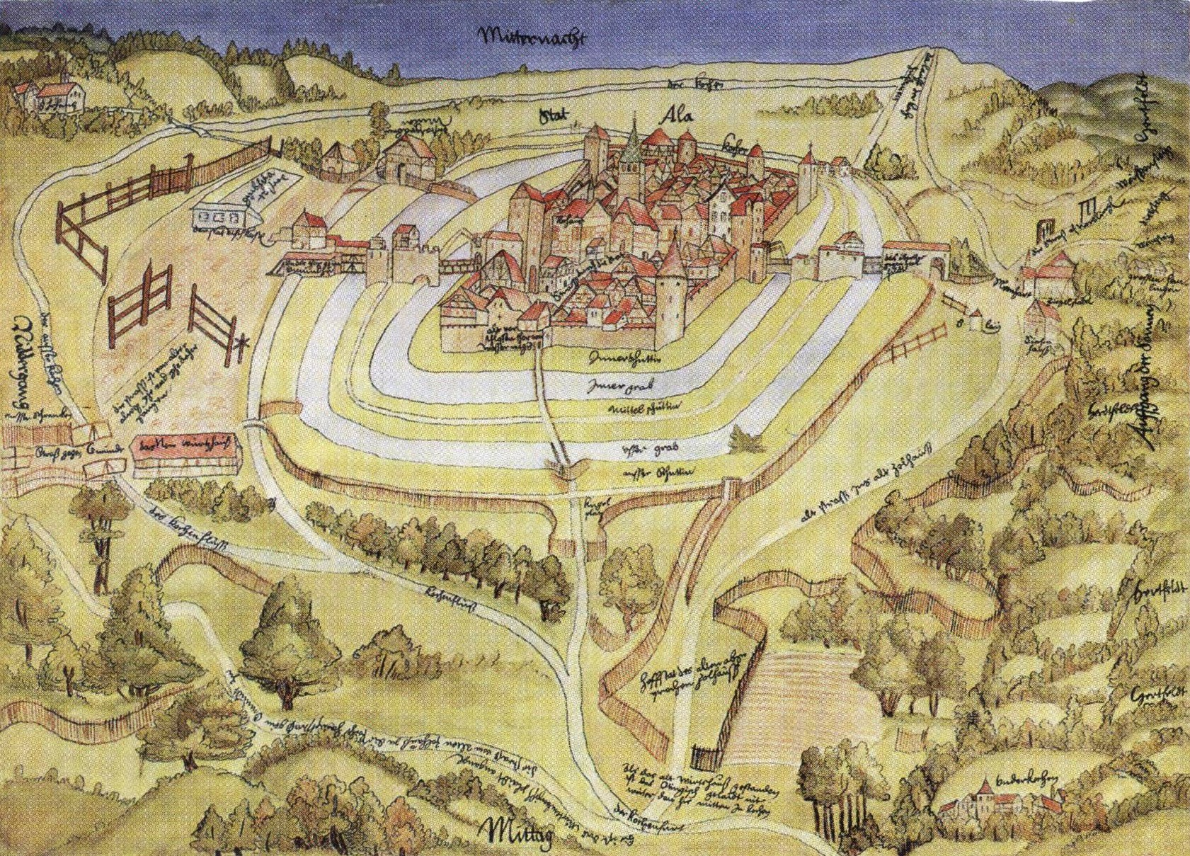 Ansicht der Stadt Aalen aus dem Jahr 1528